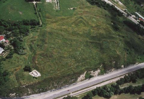 Neyergesújfalu Hungary earthfort aerialphotography